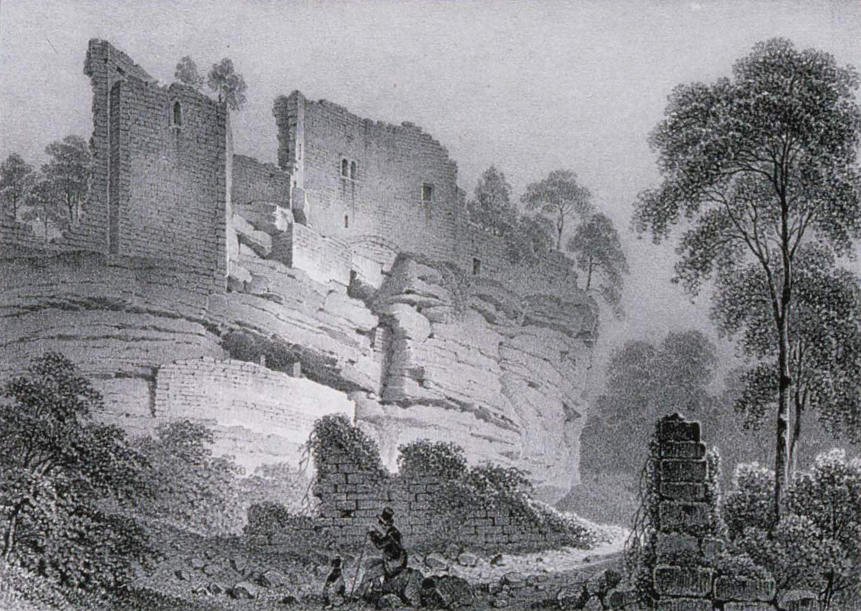 Vue du château de Schœneck